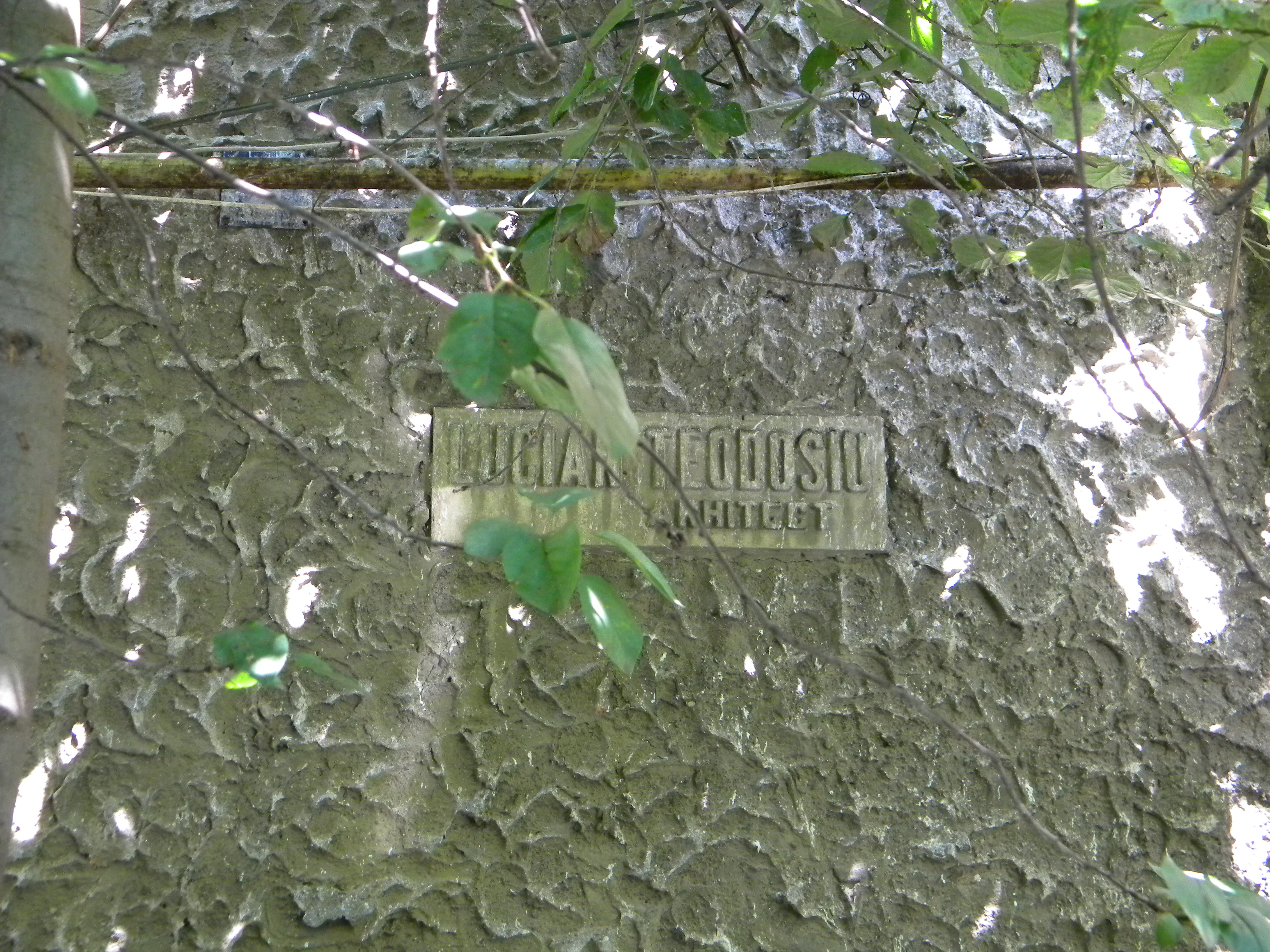 Bucuresti, Romania, Imobilul nr. 5 de pe Str. Naum Ramniceanu; B-II-m-B-19524 (arhitect Lucian Teodosiu)